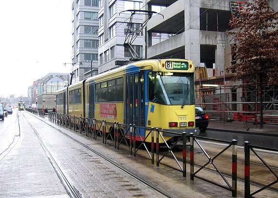 Een tram op de Brusselse tramlijn 81.